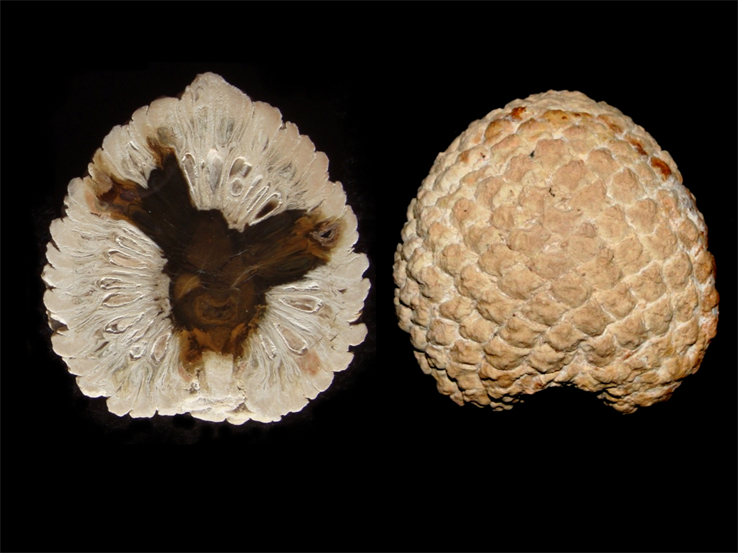 Petrified Araucaria Cone (Araucaria mirabilis (SPEGAZZINI) WINDHAUSEN, 1924); Age: Jurassic (approx. 160 mya);Location: Patagonia, Argentina